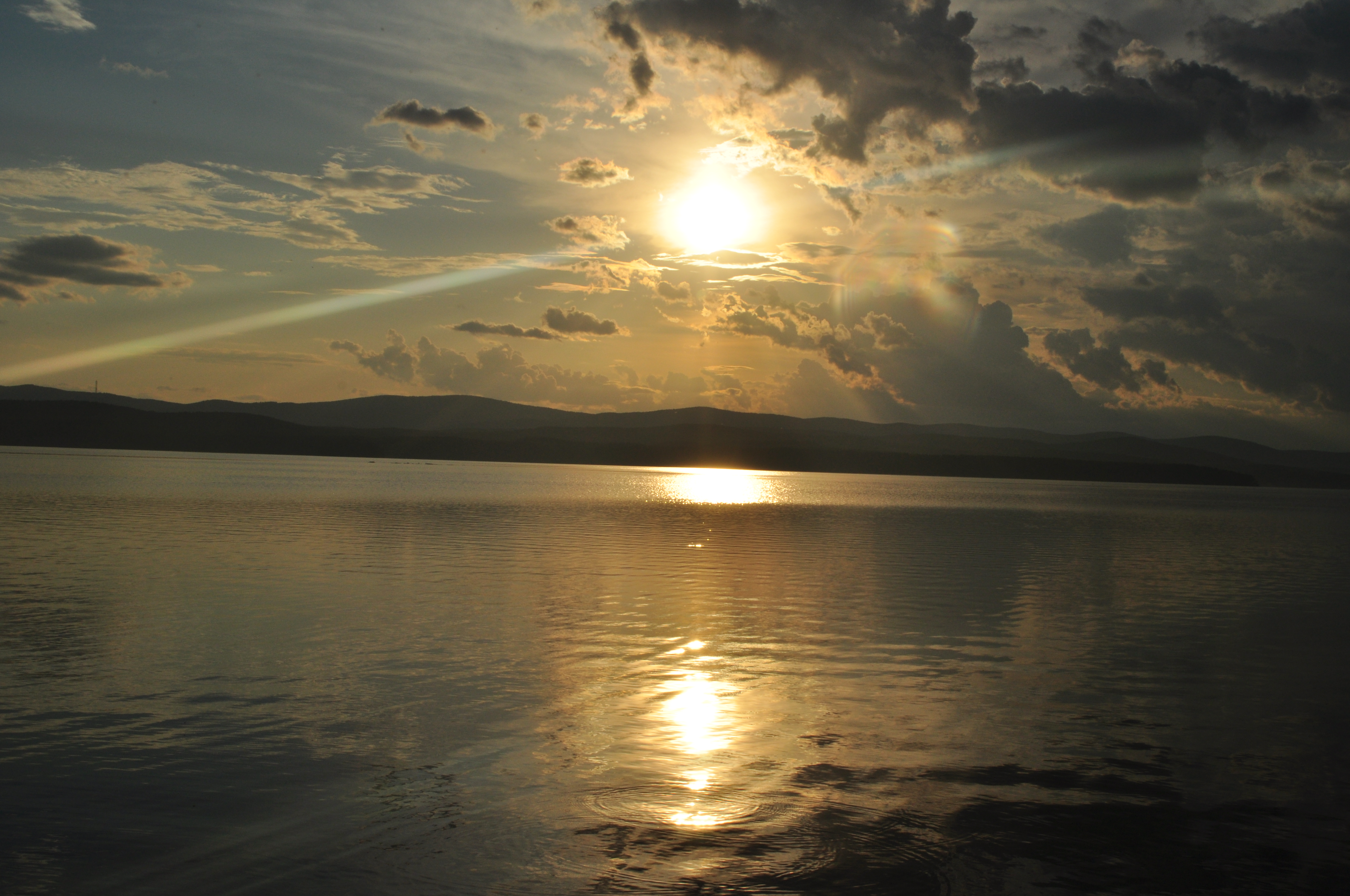 Закат на оз.Кисегач